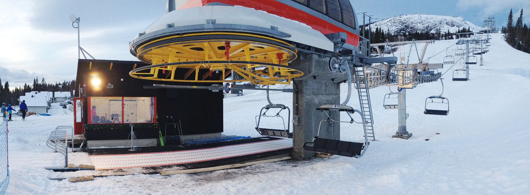 Dalstationen för Tegeliften en knapp vecka efter öppning